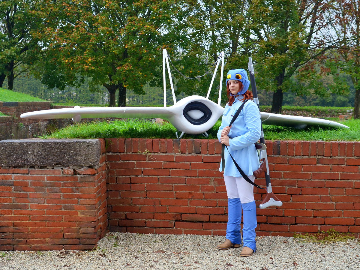 Caos in autostrada, confusione, pioggia, ma grazie ai fantastici cosplayer comunque una bellissima giornata!